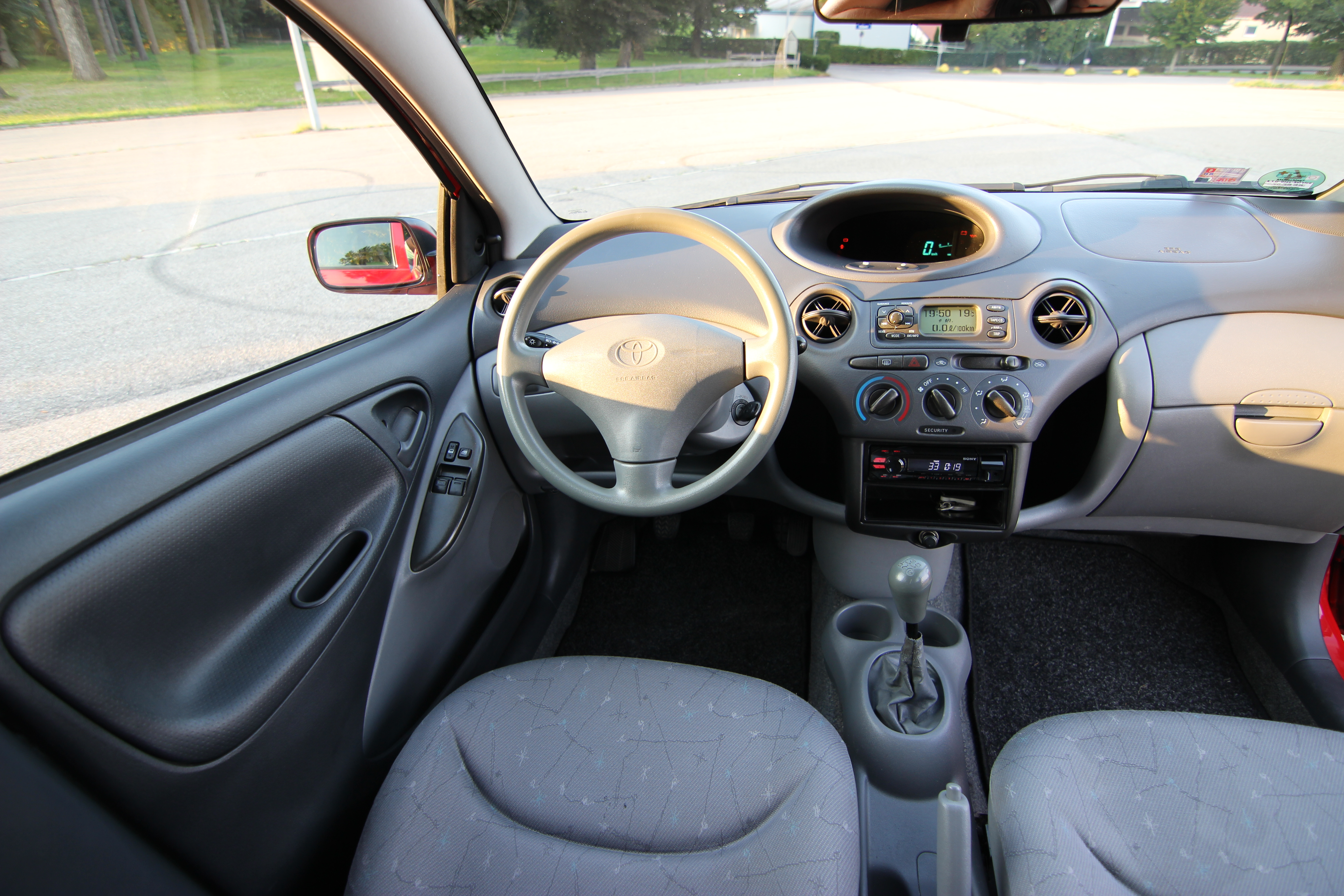 Toyota Yaris, 1.0l, P1 Toyota Yaris (XP10) hatchback